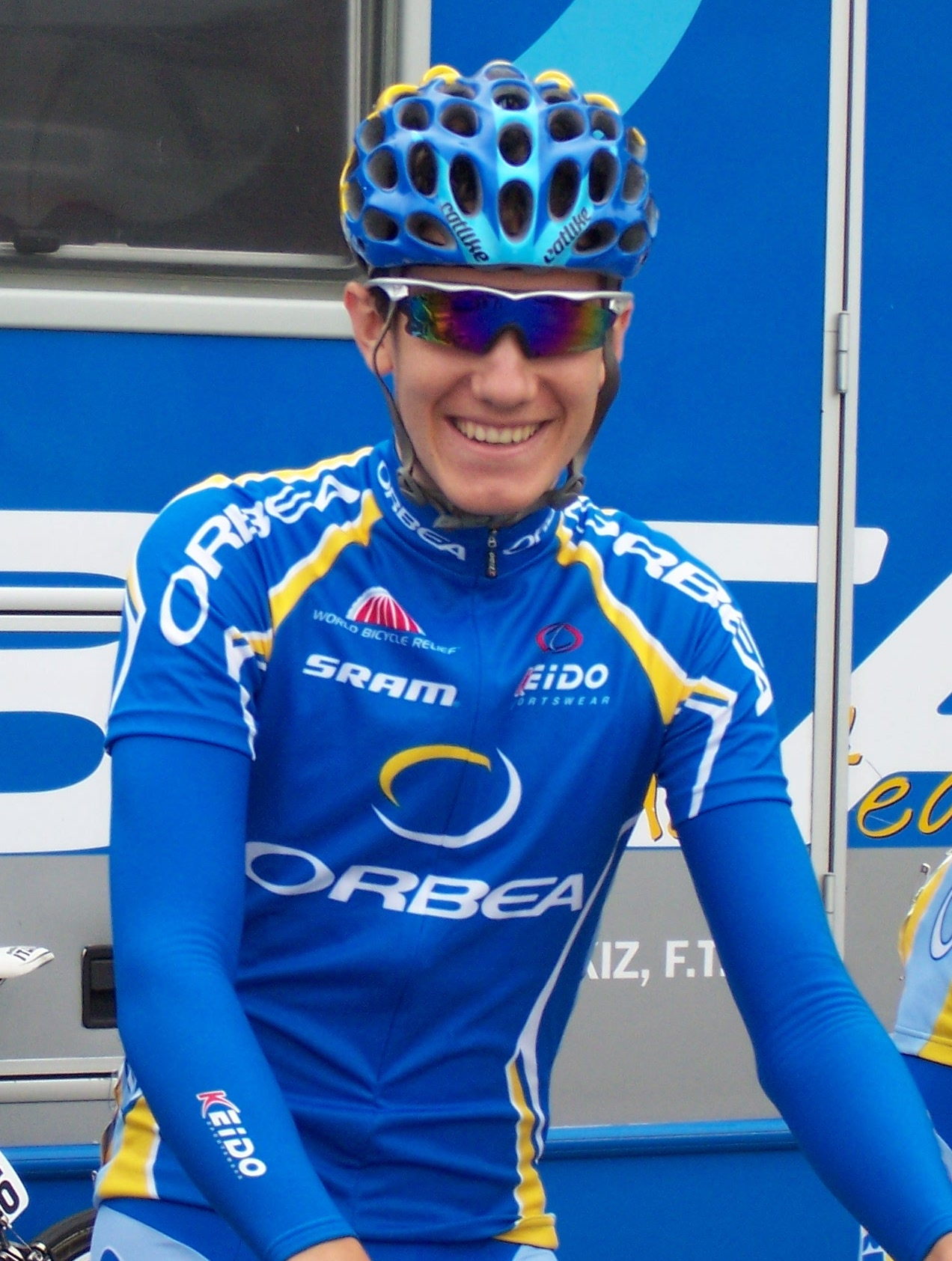 Romain Sicard, cycliste de l'équipe Orbea, lors de la première étape de la Ronde de l'Isard (22/05/2009). Photo prise avant le départ à Saint-Girons (Ariège 09, France)